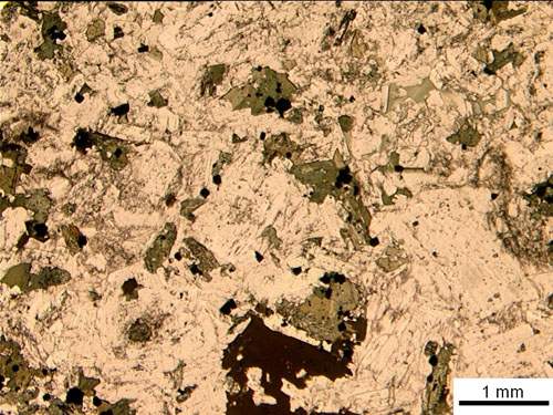 Monzonite. nicol paralleli